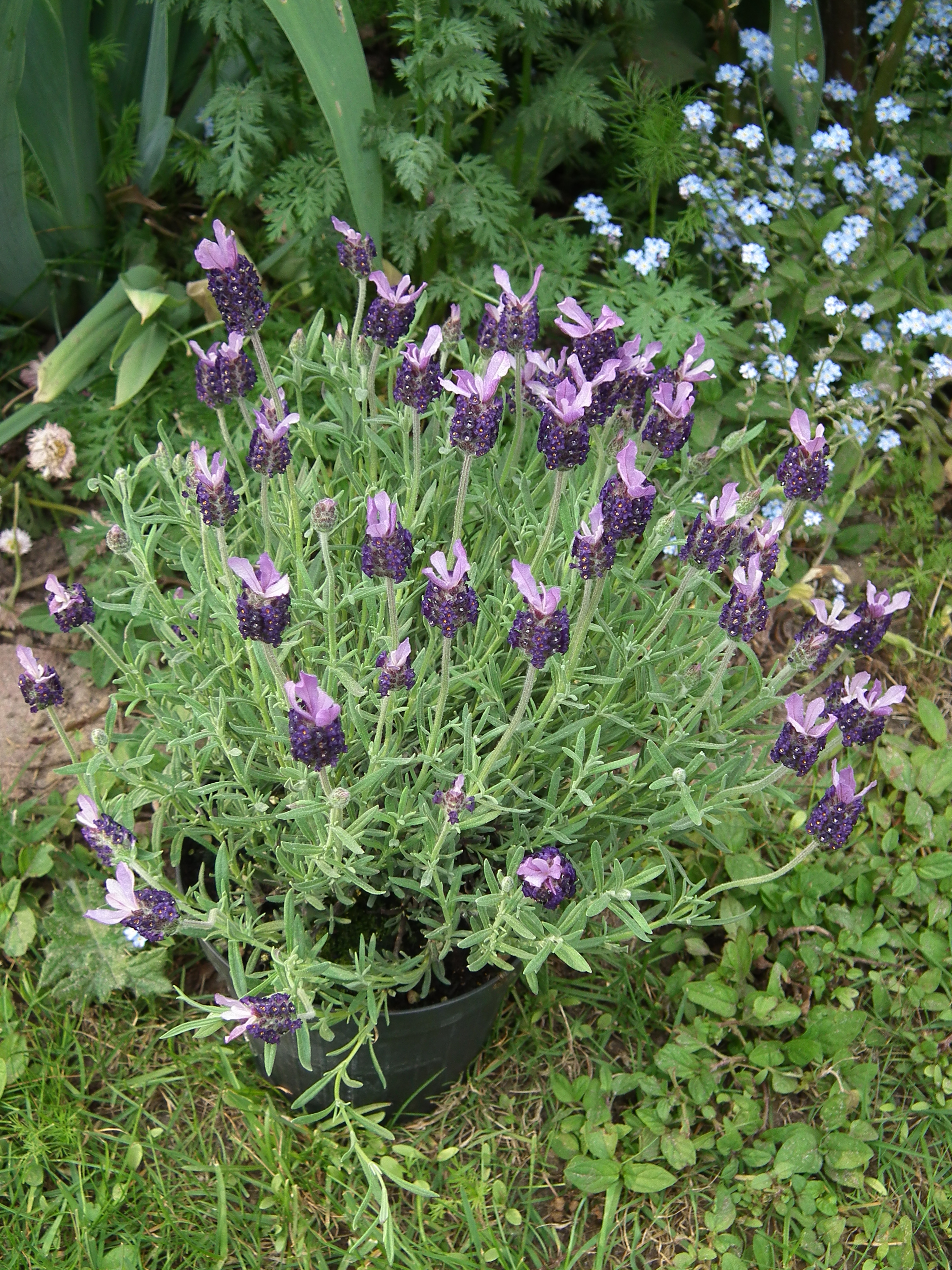 Schopflavendel (Lavandula stoechas), fotografiert in Heidelberg (Baden-Württemberg, Deutschland)